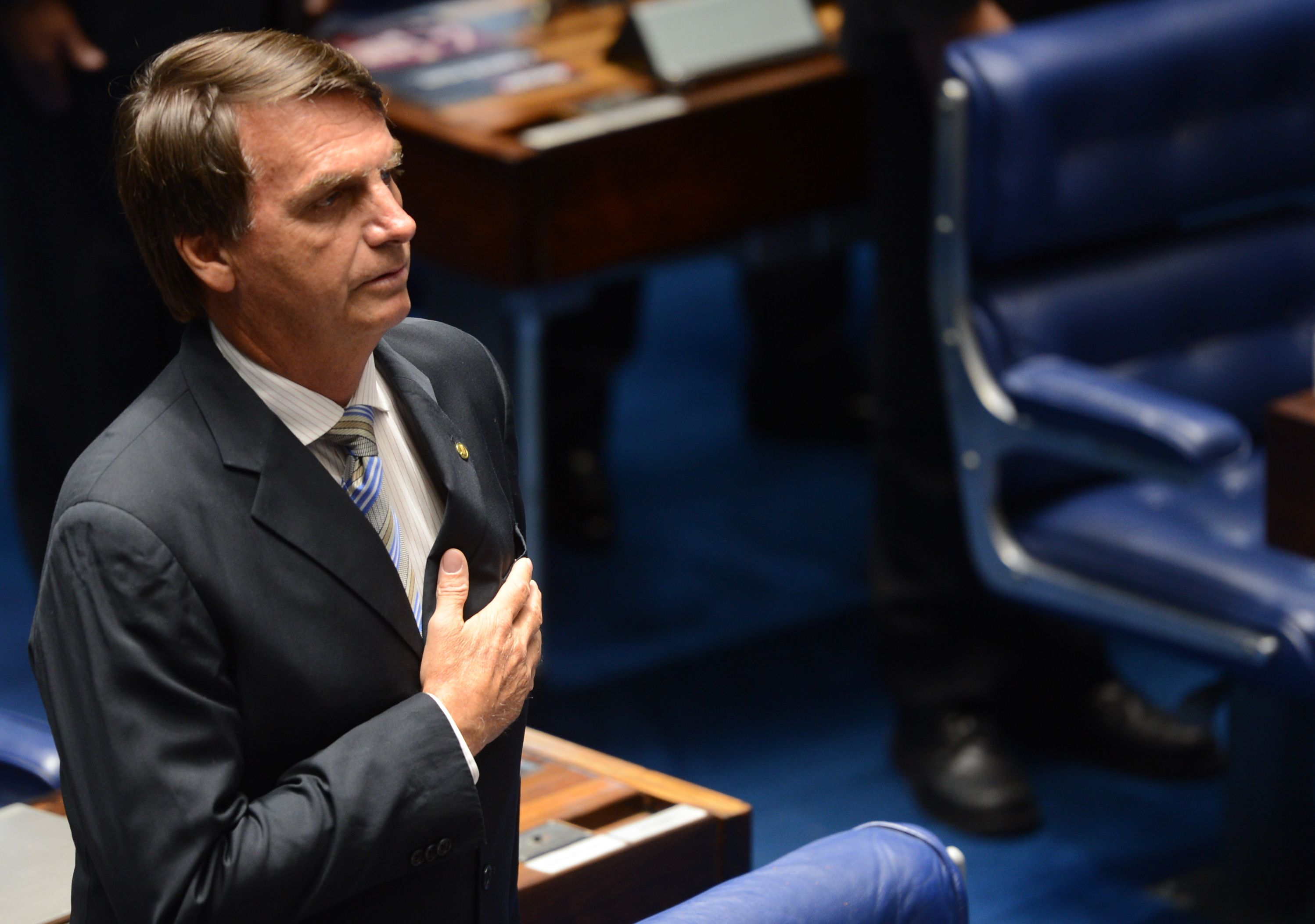 O deputado Jair Bolsonaro durante promulgação da Emenda Constitucional 77, que permite médicos militares trabalharem no SUS (Antonio Cruz/Agência Brasil)